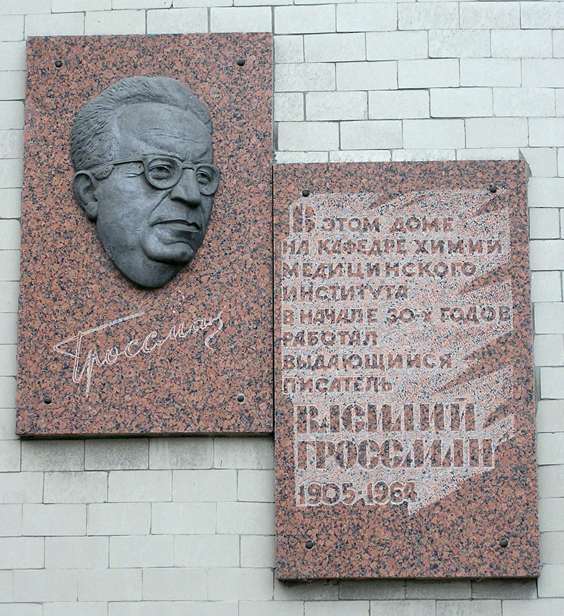 Мемориальная табличка на доме в котором работал Гроссман, Василий Семёнович в Донецке Гроссман, Василий Семёнович Vasilij Grossman Vasily Grossman